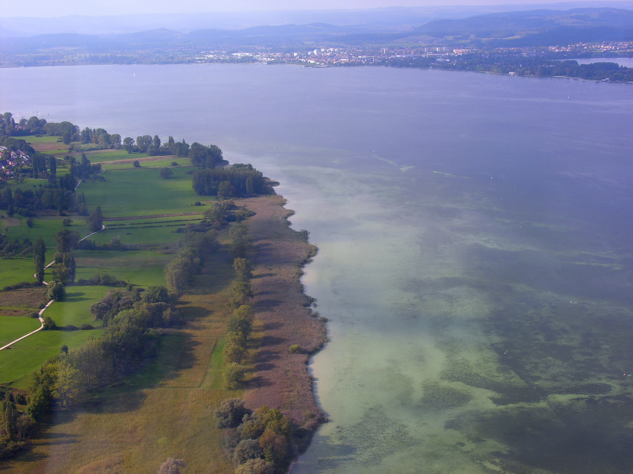 Germany, Baden-Württemberg, aerial view near Gaienhofen, "Hornspitze auf der Höri" nature reserve